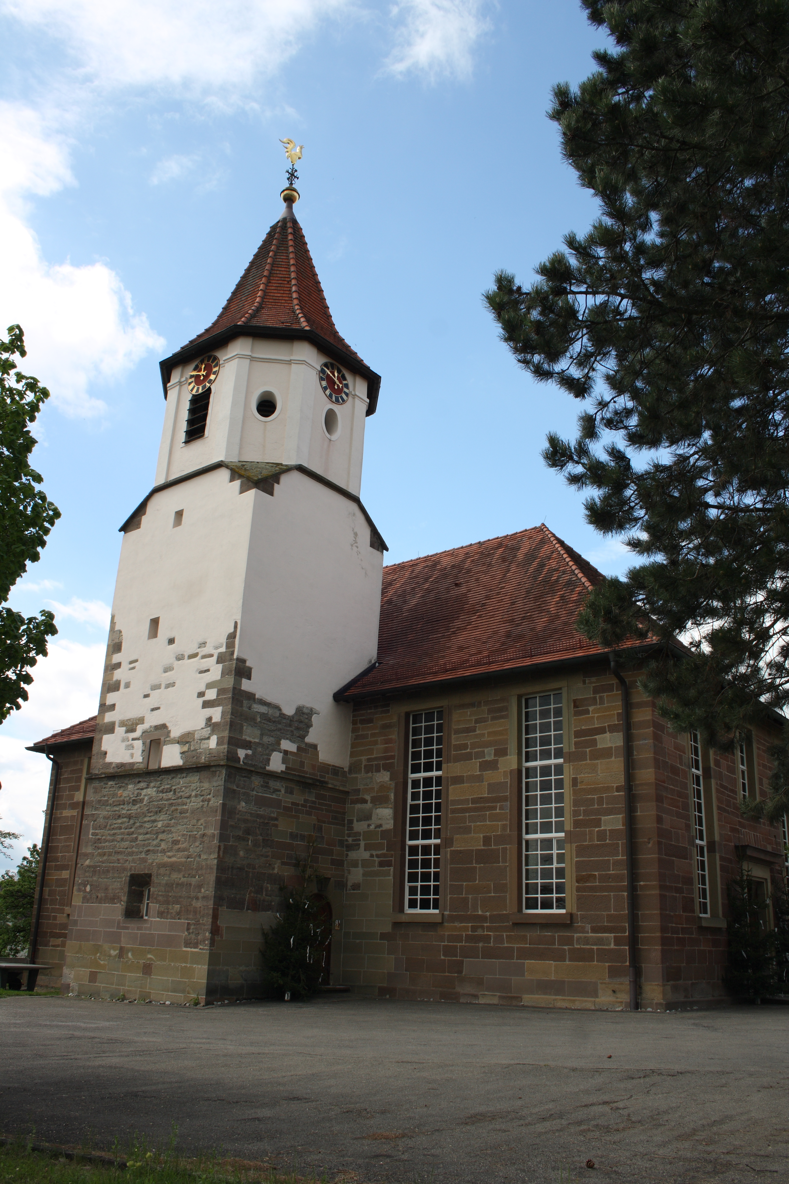 Evangelische Kirche in Großaltdorf, einem Stadtteil von Vellberg im Landkreis Schwäbisch Hall (Baden-Württemberg